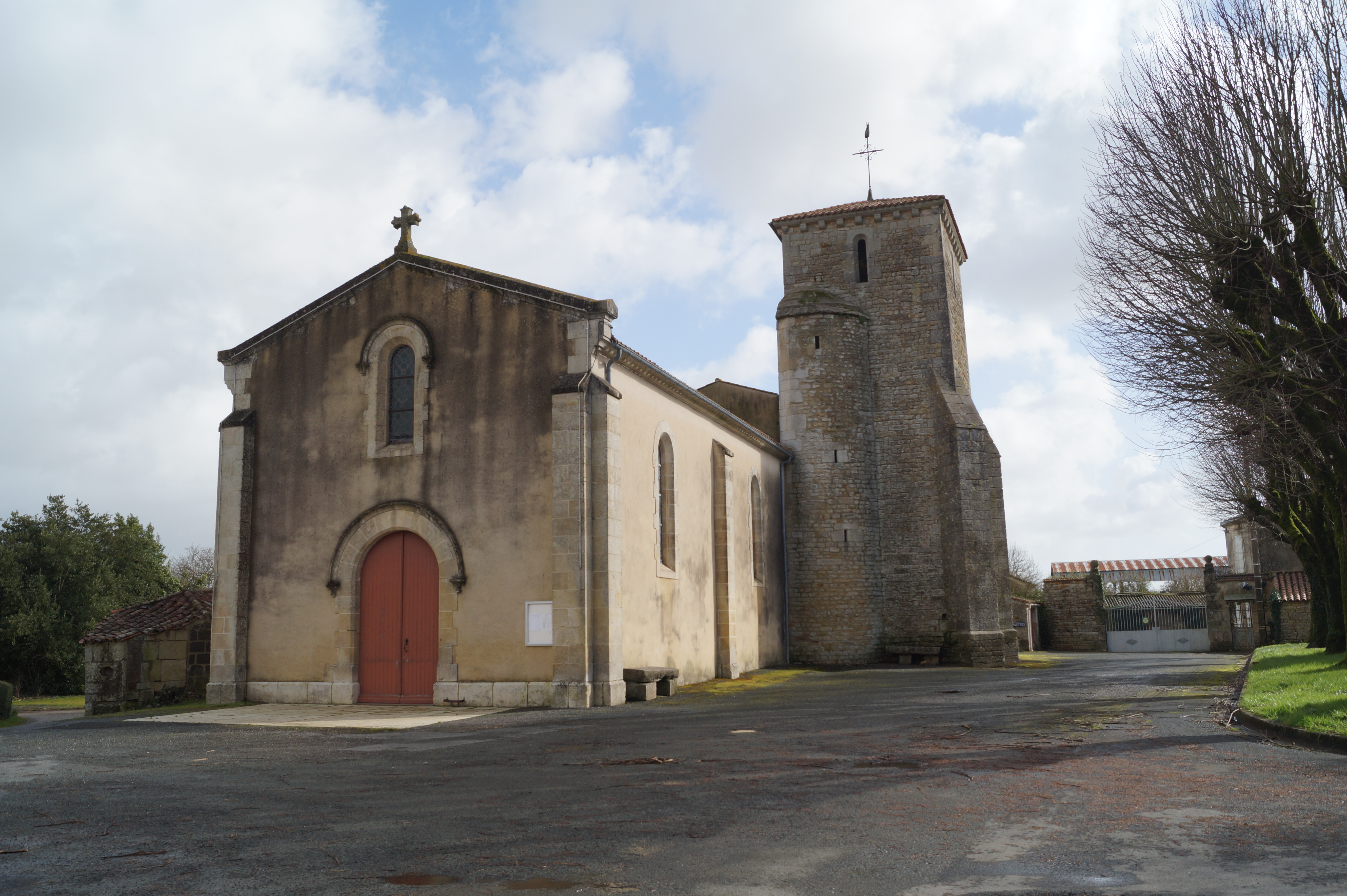 L’église Saint-Sulpice de Péault depuis la place de l’Église.